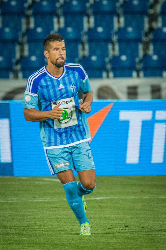 fotbalový hráč Mladé Boleslavi